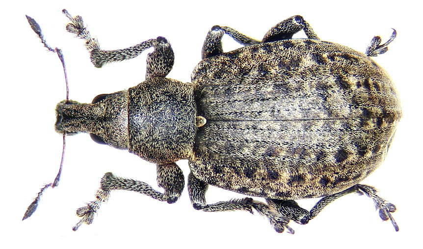 Familie: Curculionidae Groesse: 17-11 mm Verbreitung: Europa Fundort: Germania, Bayern, Oberfranken, Selbitz leg.det. U.Schmidt, 1999 Photo: U.Schmidt, 2005